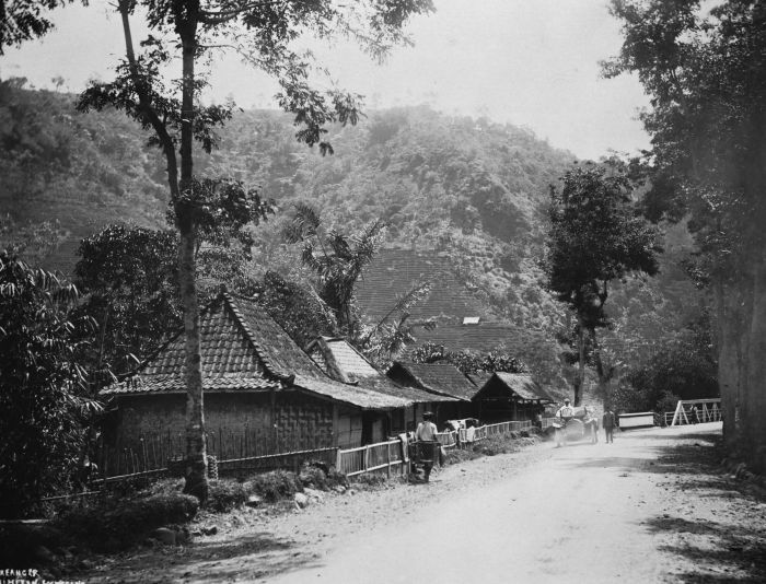 Foto. Auto op weg van Tjiherang naar Soemedang